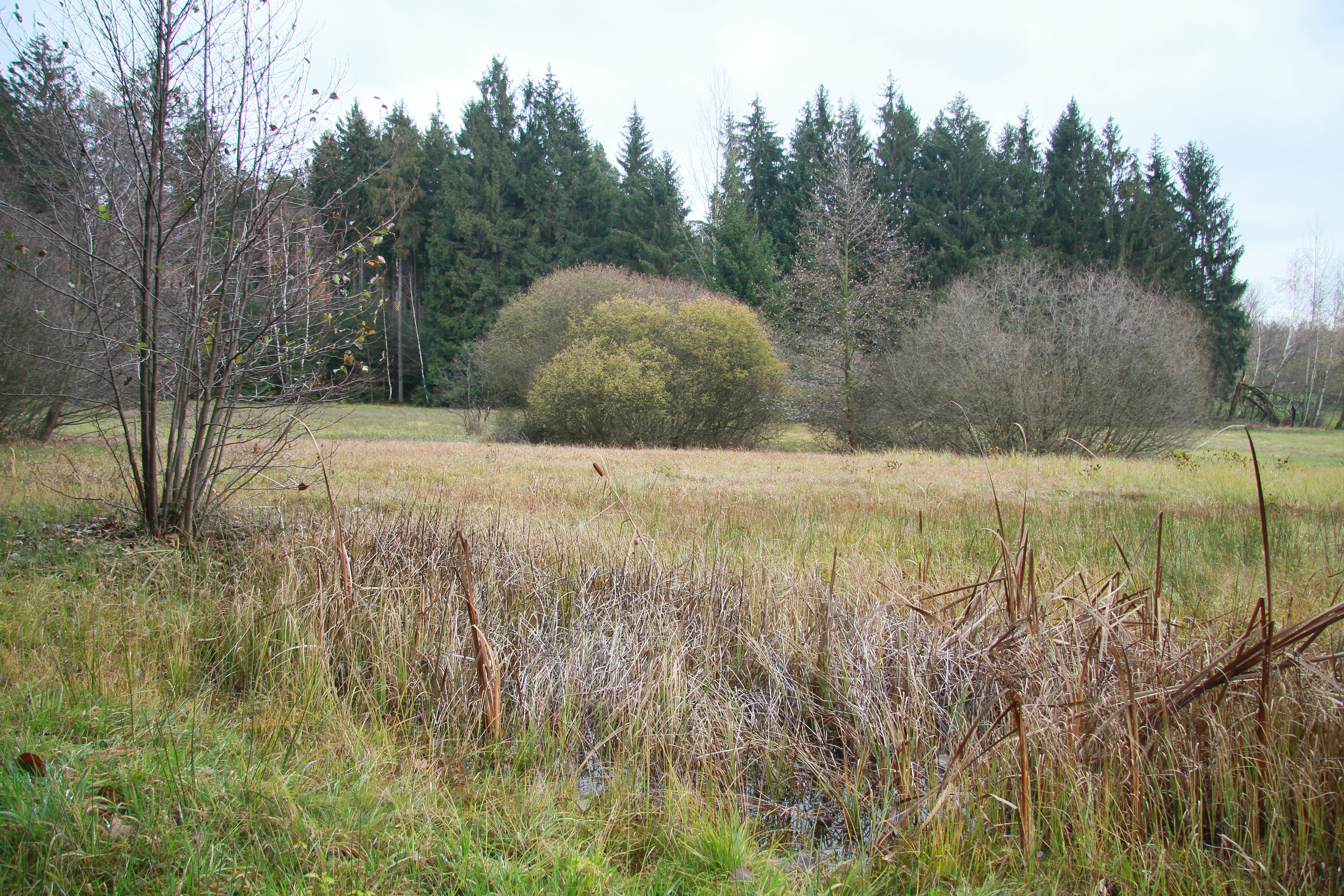 Uměle vytvořené tůně